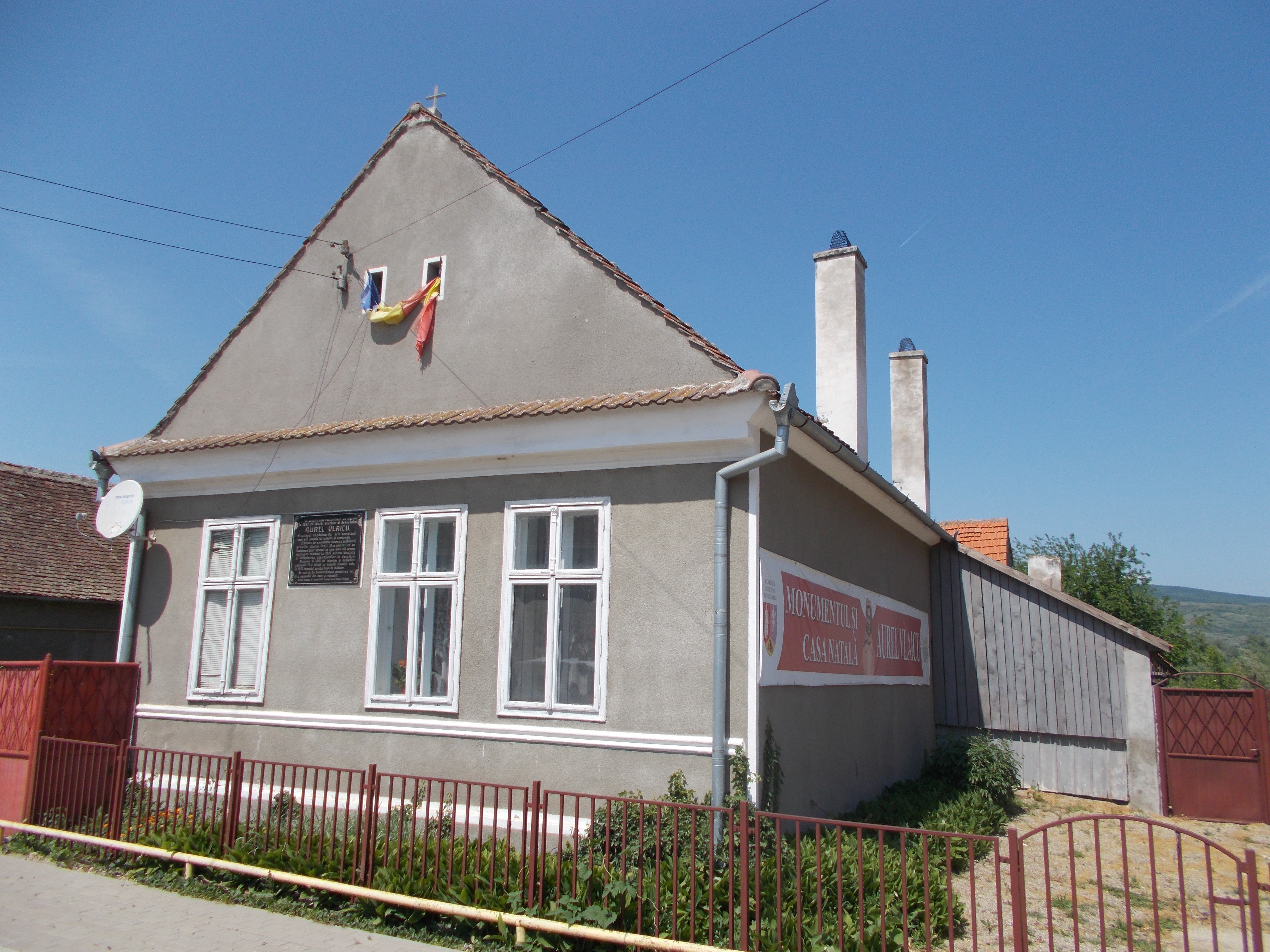 Casa natală Aurel Vlaicu, Binținți, Hunedoara